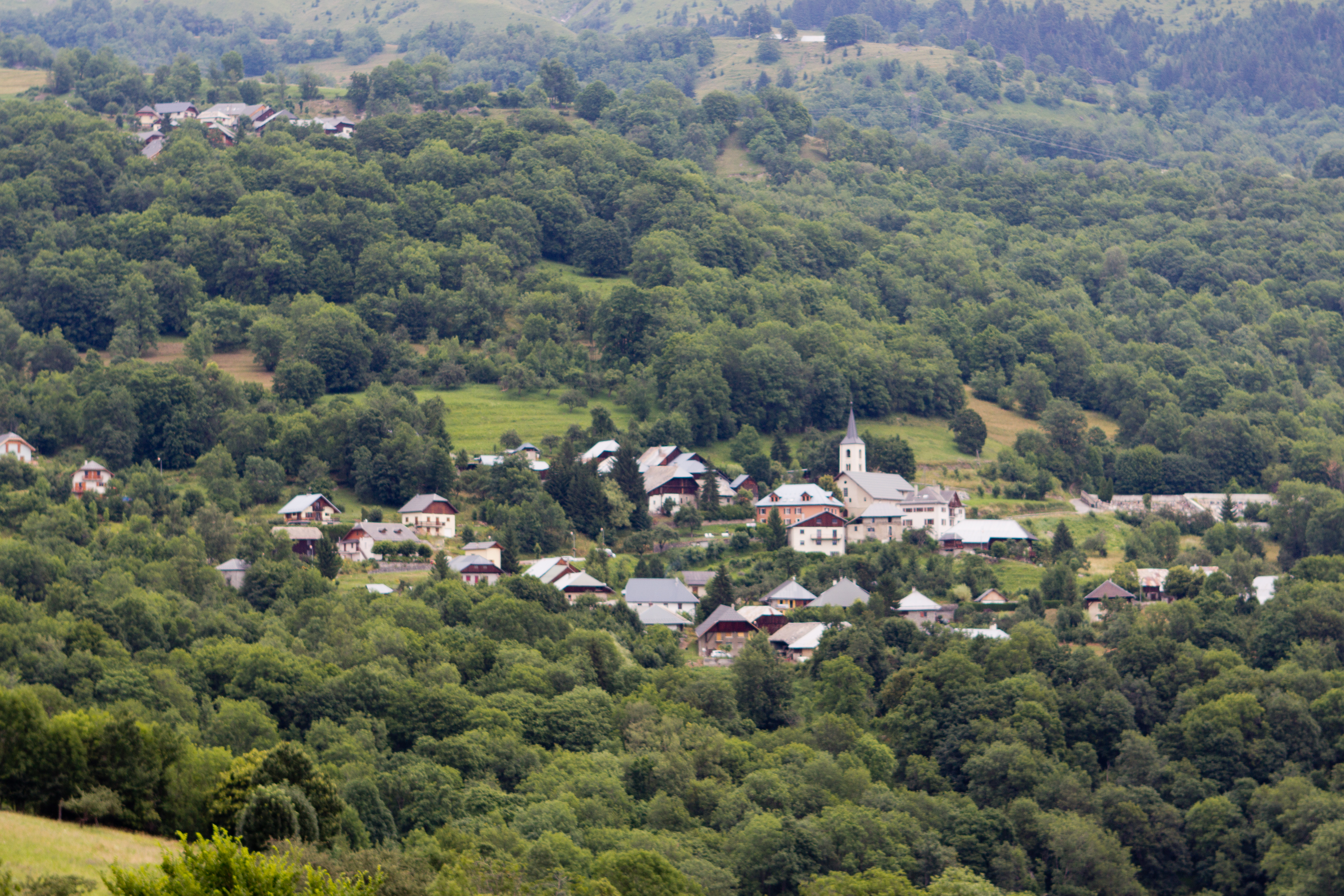 Vue de Montaimont, commune de Montaimont, département de Savoie. France.